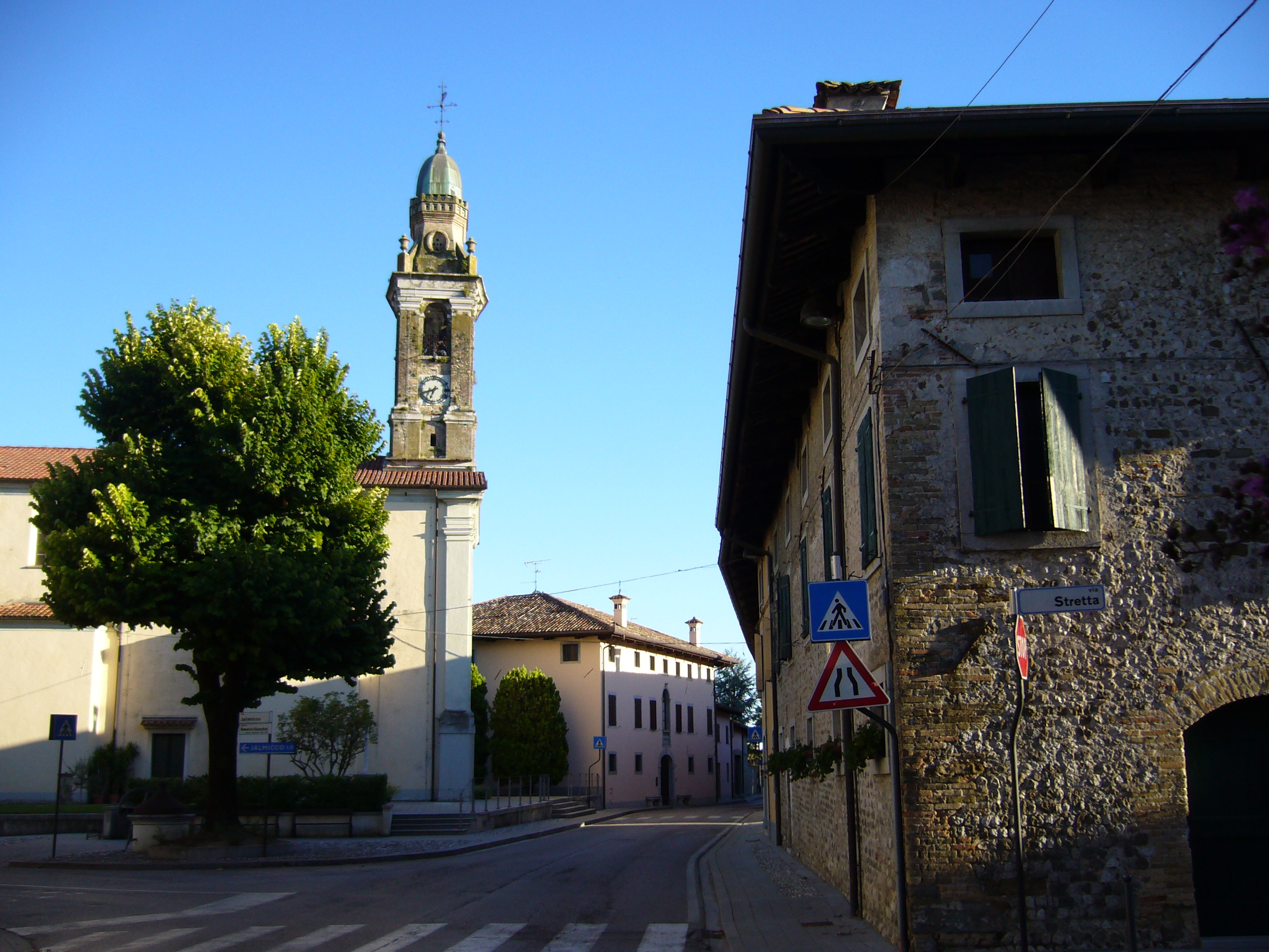 Clauiano, frazione di Trivignano Udinese (UD), Italia